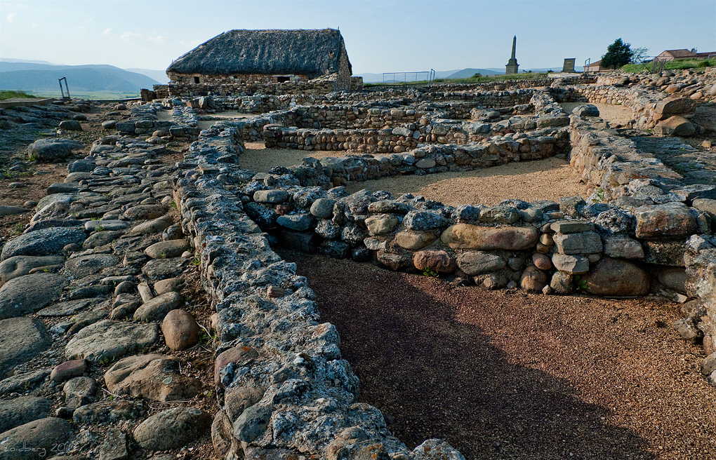 Numancia